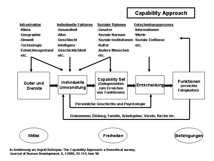 Schema zum Capability Approach